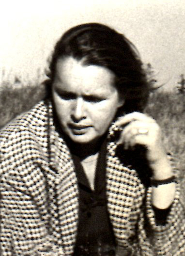 C.S.D. Kleinert, Krkonoše 1971